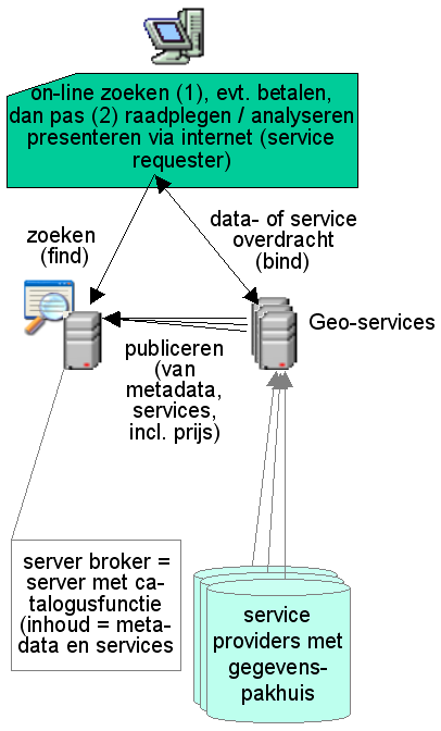 Eigen gemaakte media. Deze GIS-architectuur toont zoals een geo-portaal behoort te zijn. Op basis van geo-services, die door de eindgebruiker gevonden, gekozen en (al of niet na betaling) kunnen worden gecombineerd. Het is niet alleen een GIS-viewer, op basis van geo-services, het combineren vindt nergens anders plaats dan op de cliënt.